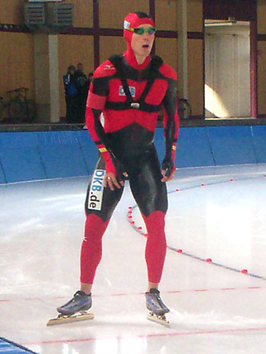 Überprüfungswettkampf (Berlin, Deutschland)